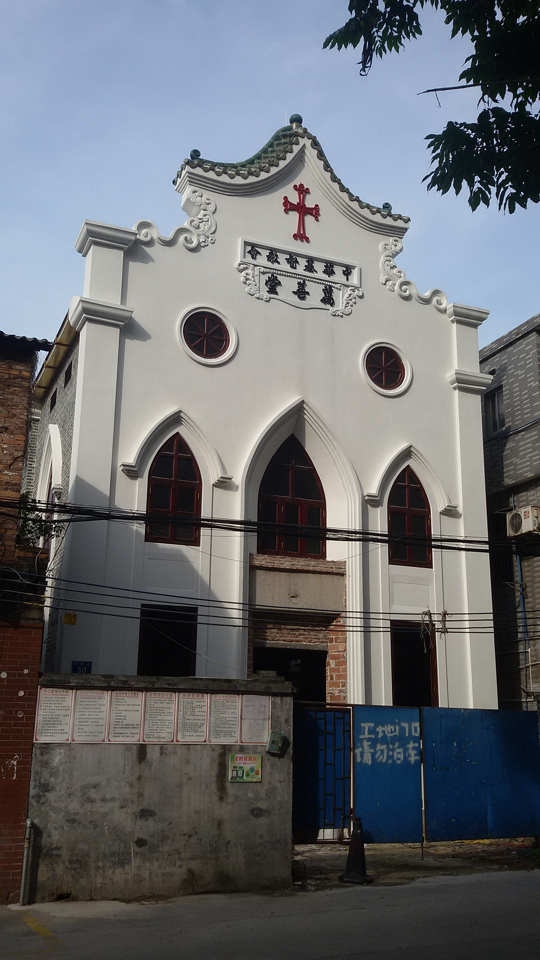 粵語: 廣州市荔灣區萬善堂